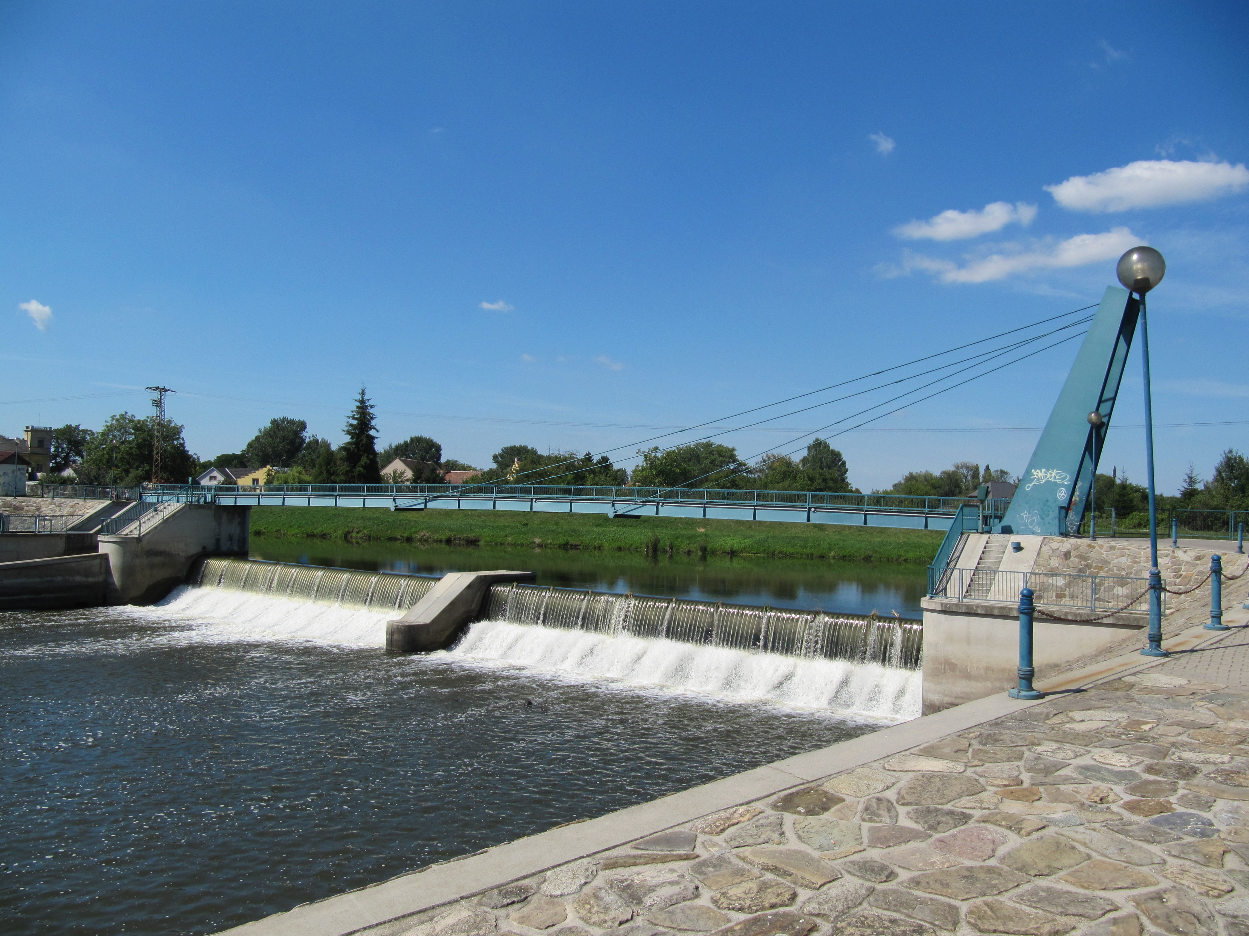 Veselí nad Moravou, jez